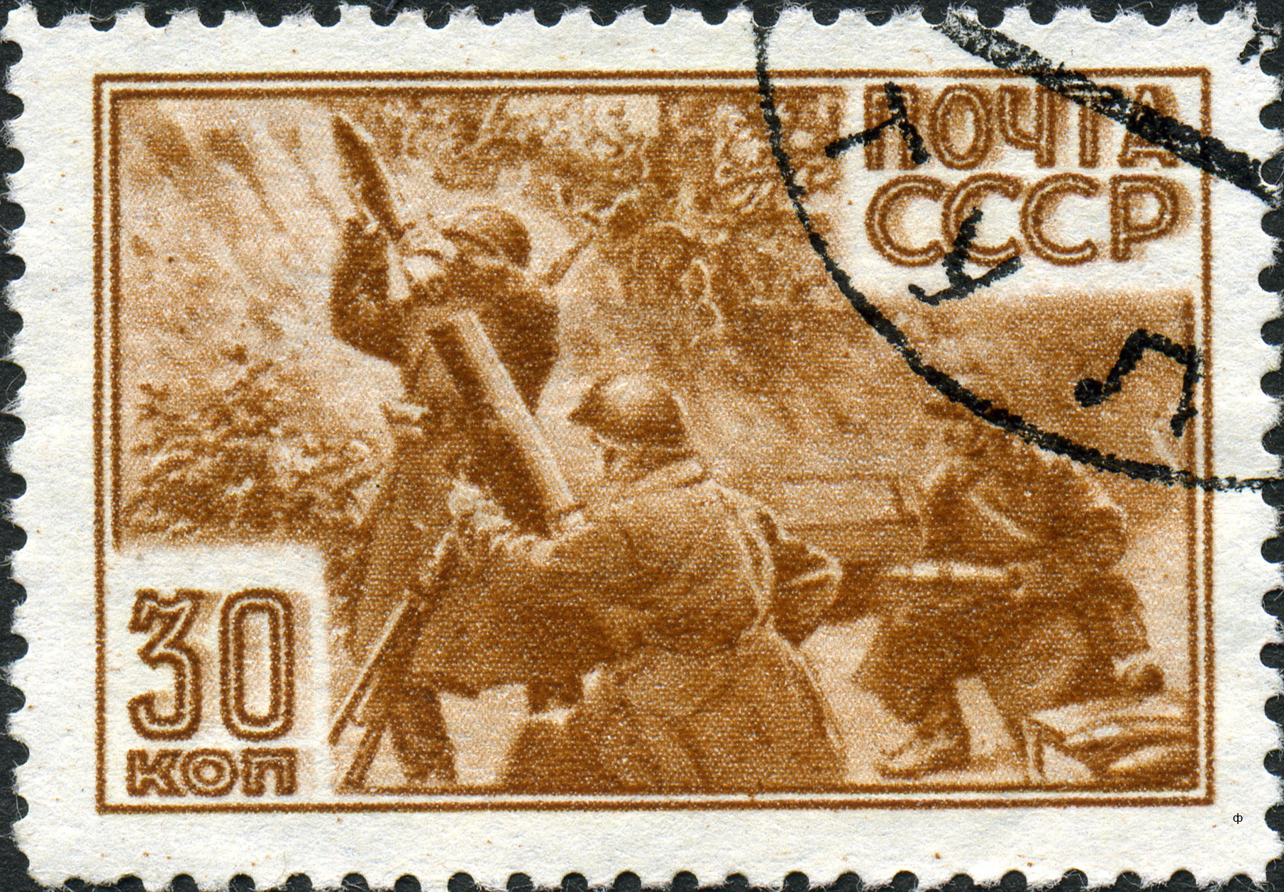 Марка СССР